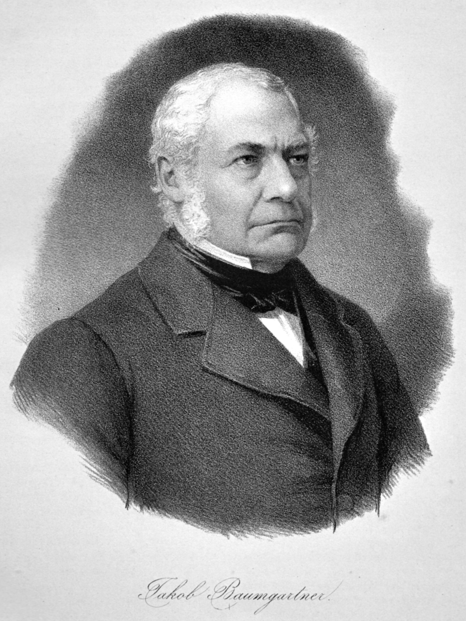 Gallus Jakob Baumgartner, St. Galler Politiker und Staatsmann